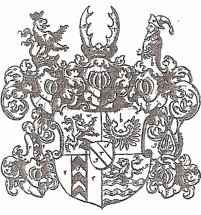 Wappen der Markgrafen von Baden 1703. (um 1560). Die Markgrafschaft Baden-Durlach war ein frühneuzeitliches Territorium des Heiligen Römischen Reiches und bestand von 1535 bis 1771.